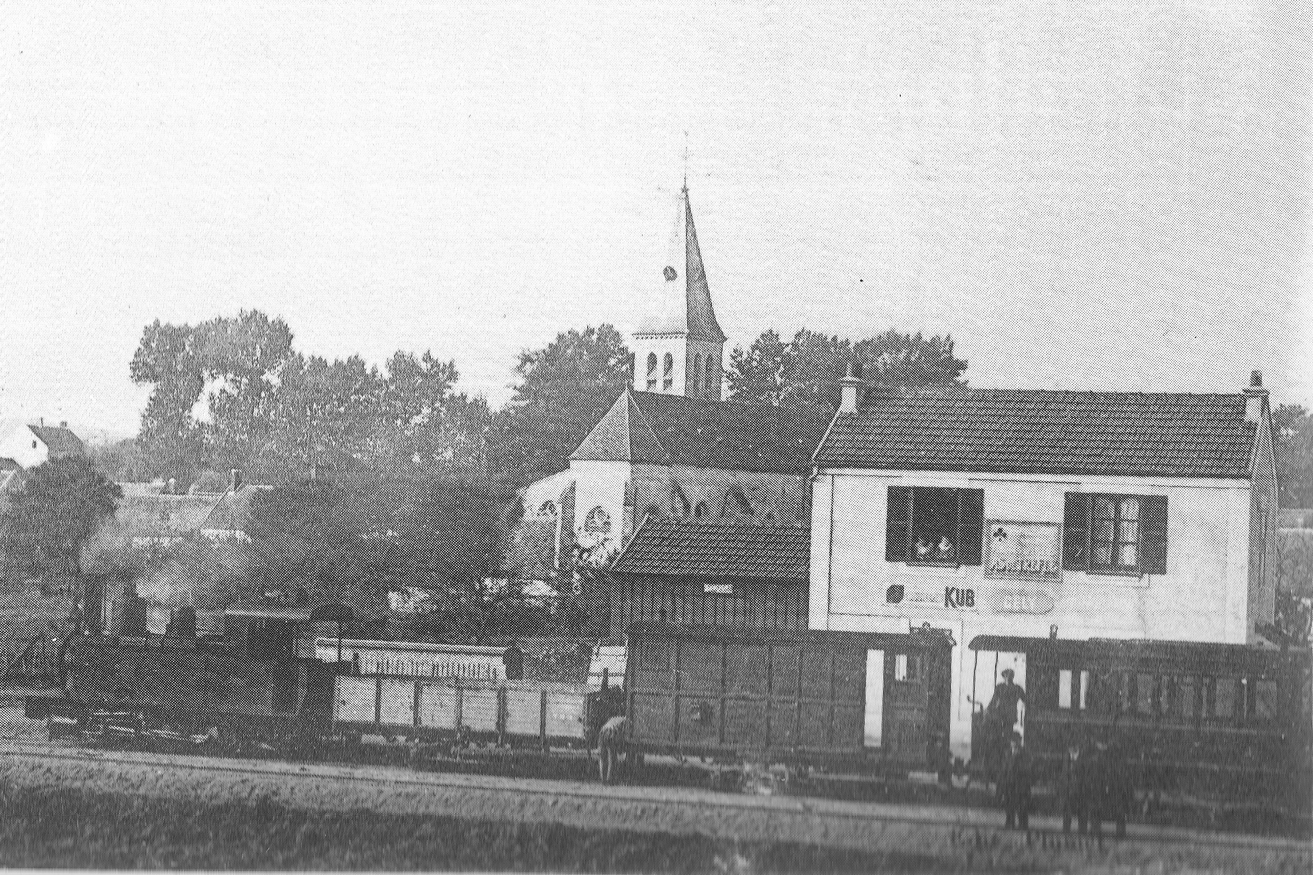 Le tramway de Barbizon - Tramway Sud de Seine-et-Marne - en gare de Cély (Seine-et-Marne, France).